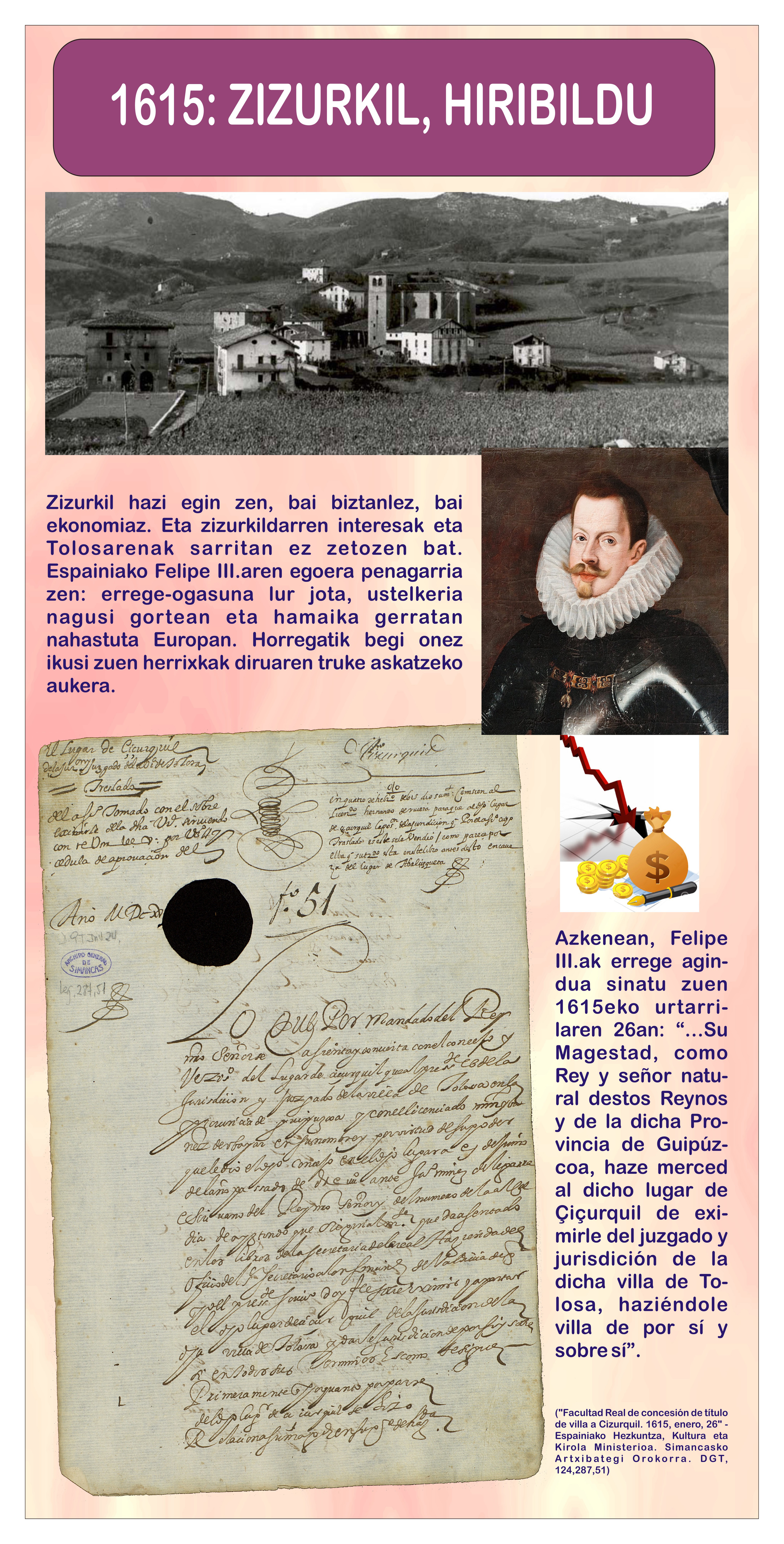 Zarateko benta izeneko trikuharria